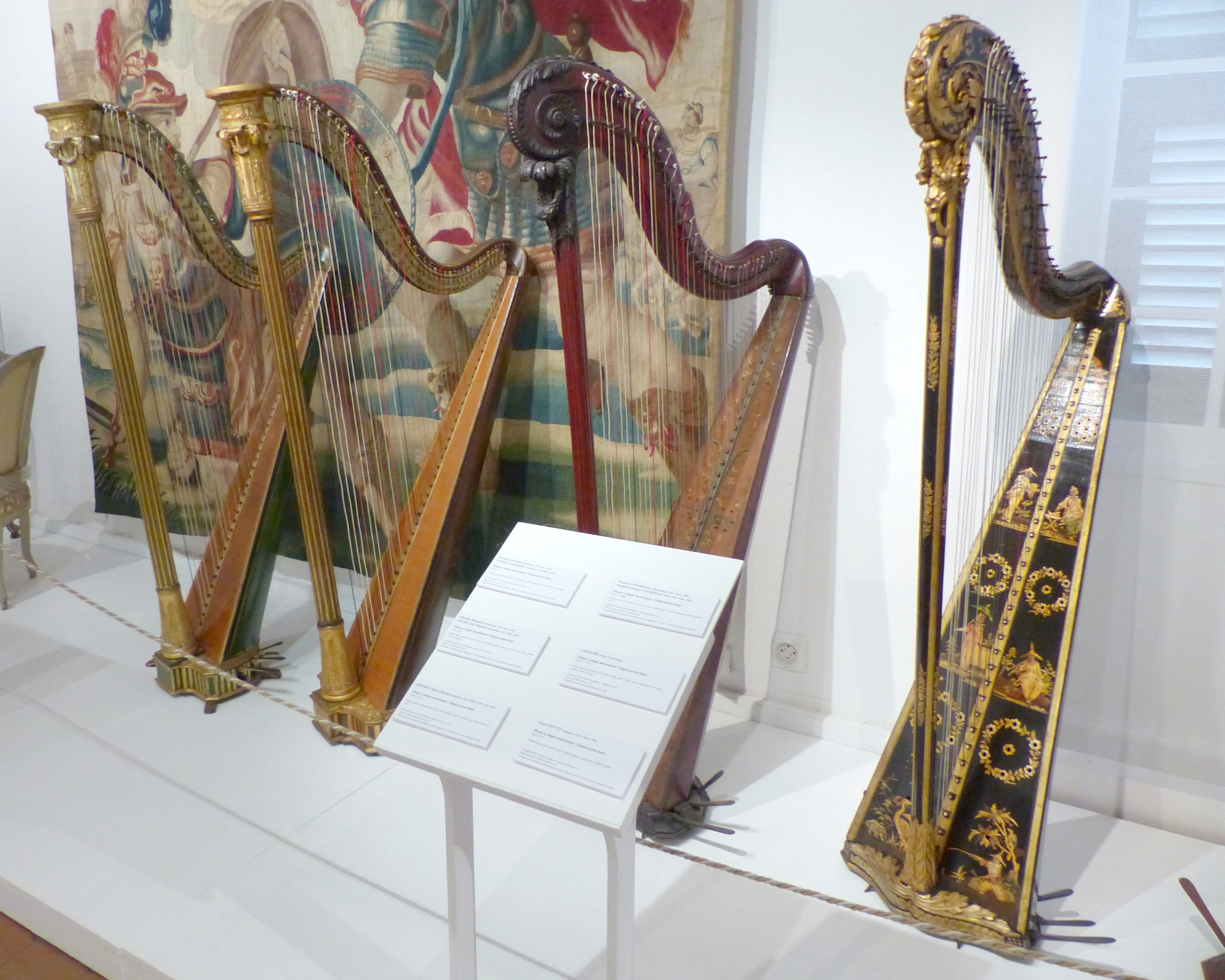 Nice (Alpes-Maritimes, France), au cœur du Vieux Nice, le palais Lascaris avec, entre autres, sa fabuleuse collection d'instruments de musique anciens, la deuxième de France. Harpes à pédales, les deux de gauche sorties de l'atelier des frères Erard.